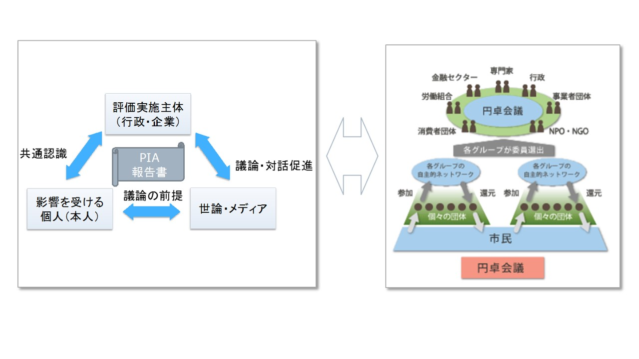 プライバシー影響評価とマルチステークホルダー・プロセスにおけるフレームワーク